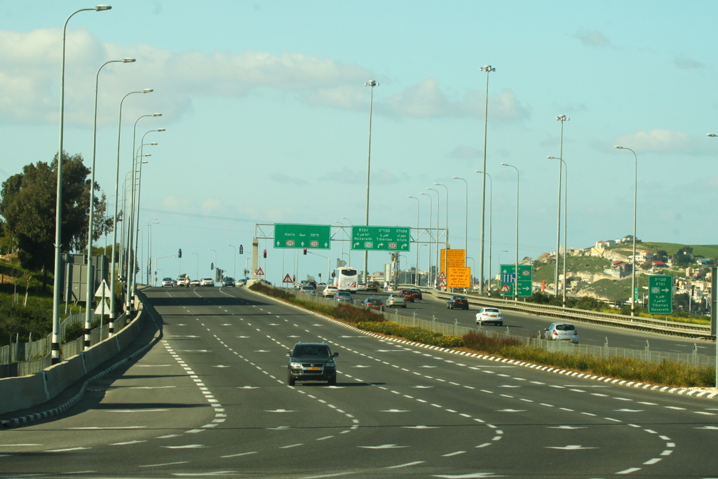 צומת התשבי